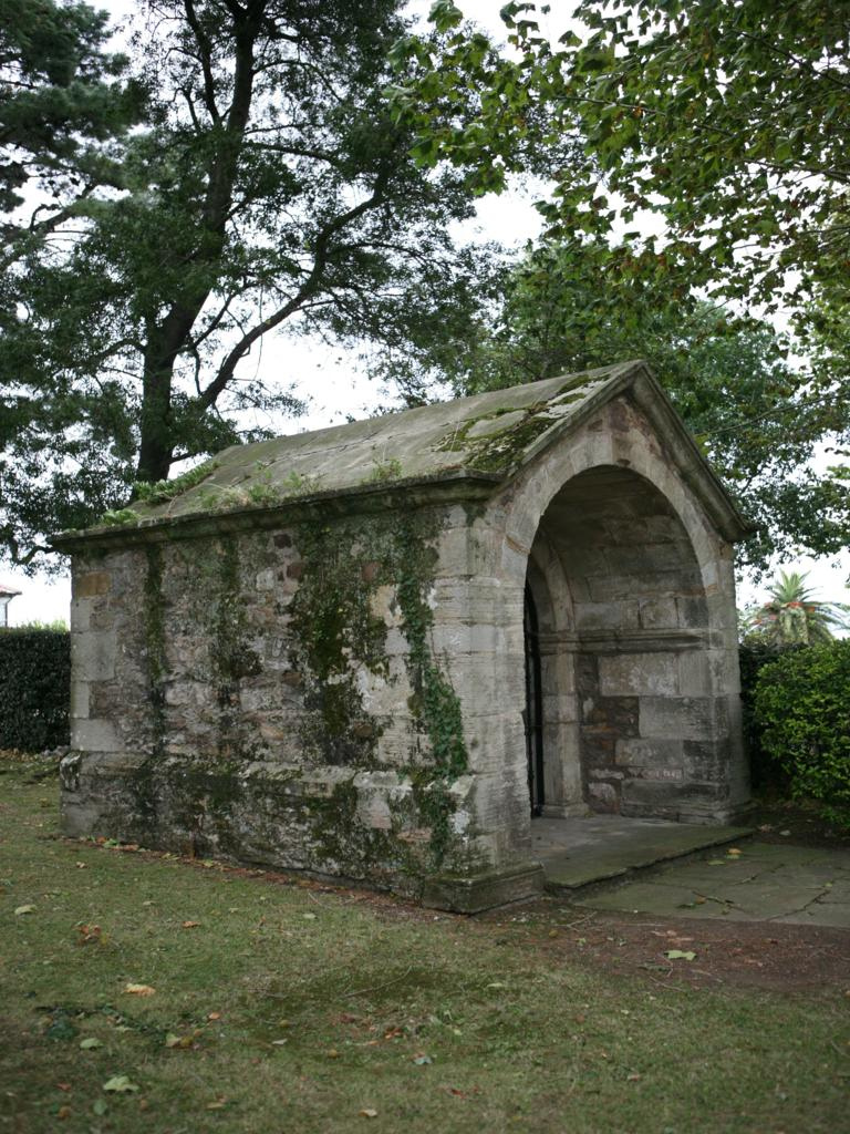 Santucos de las ánimas (Conjunto escultural). Museo Etnográfico de Cantabria Camargo